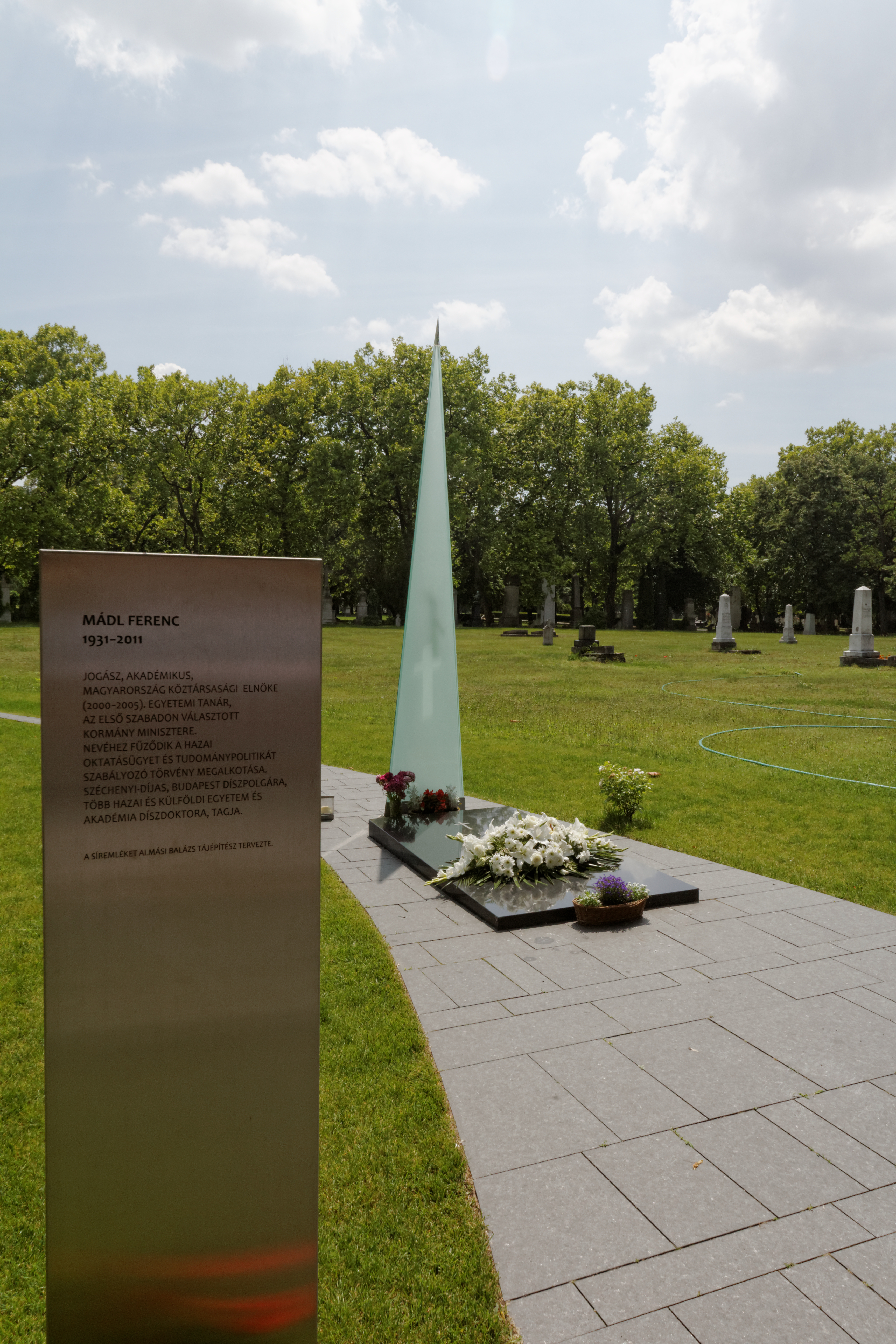 Grabmal Ferenz Madl